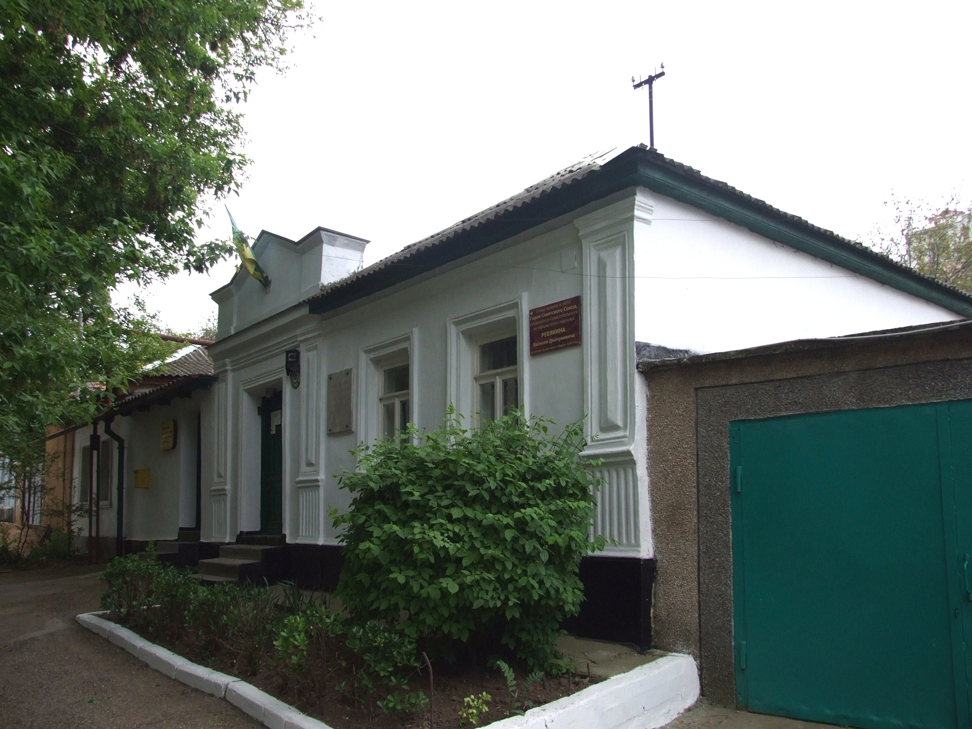 Будинок, у якому знаходилася підпільна типографія. м. Севастополь, вул. В. Ревякіна, 46